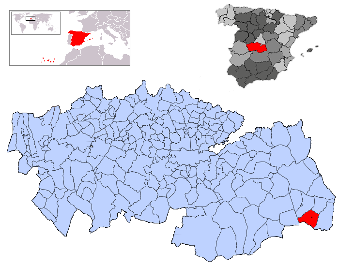 Miguel Esteban en la provincia de Toledo